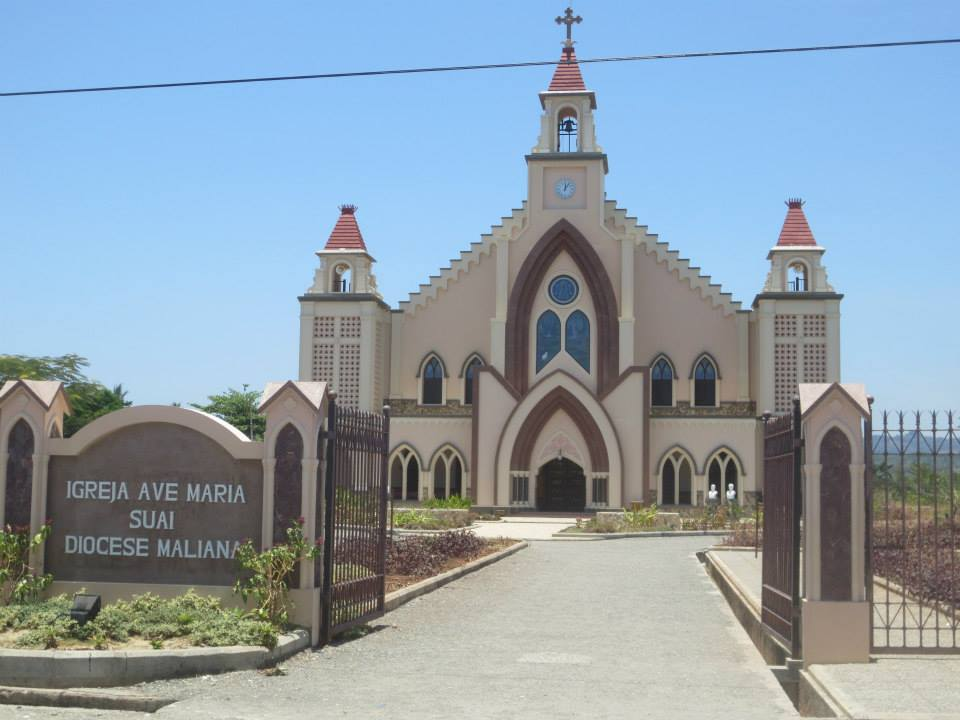 Neue Ave Maria Kirche von Suai